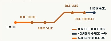 Bouregrag_Mo